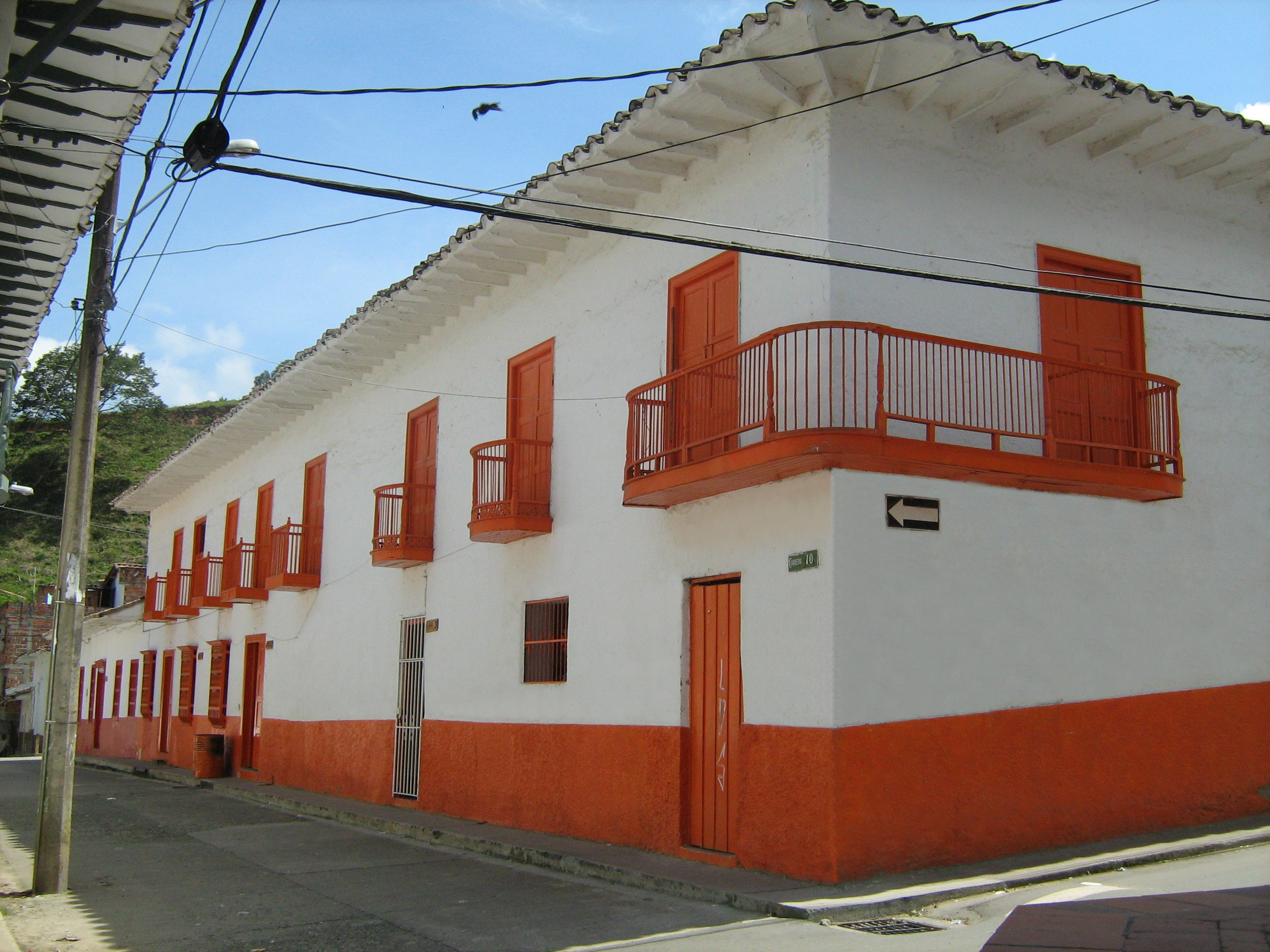 Casa de la cultura del Municipio de Barbosa, Antioquia, Colombia.